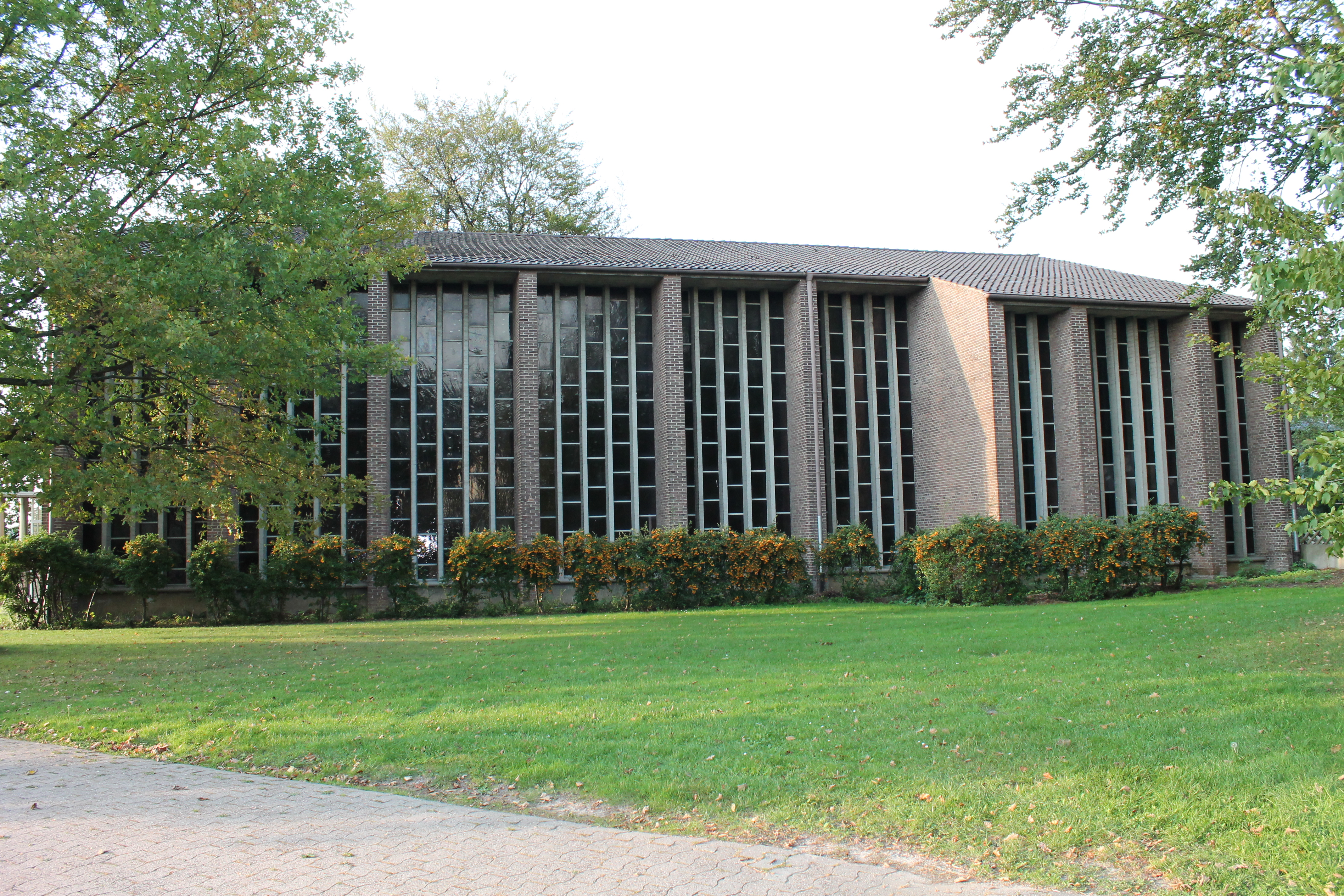 Herford, Baudenkmal 478